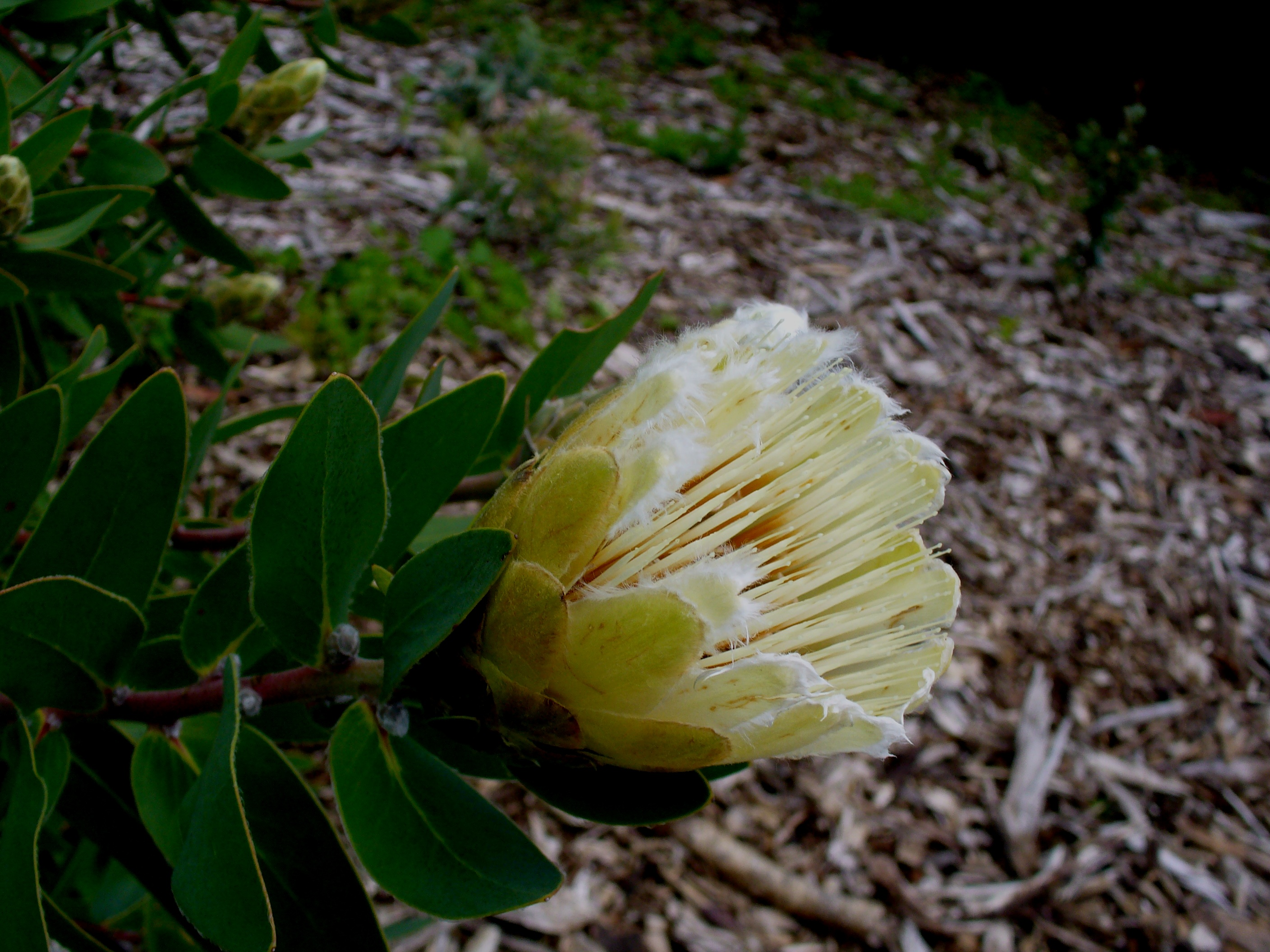 Protea mundii flower